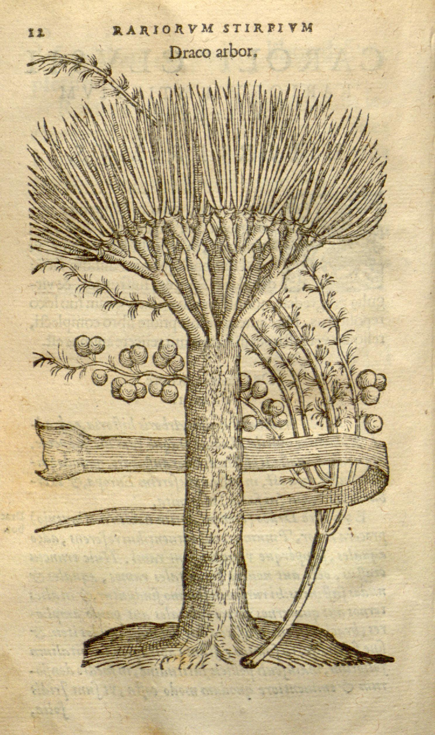 Caroli Clusii Atrebat Rariorum alioquot stirpium per Hispanias observatarum historia :libris duobus expressas ...